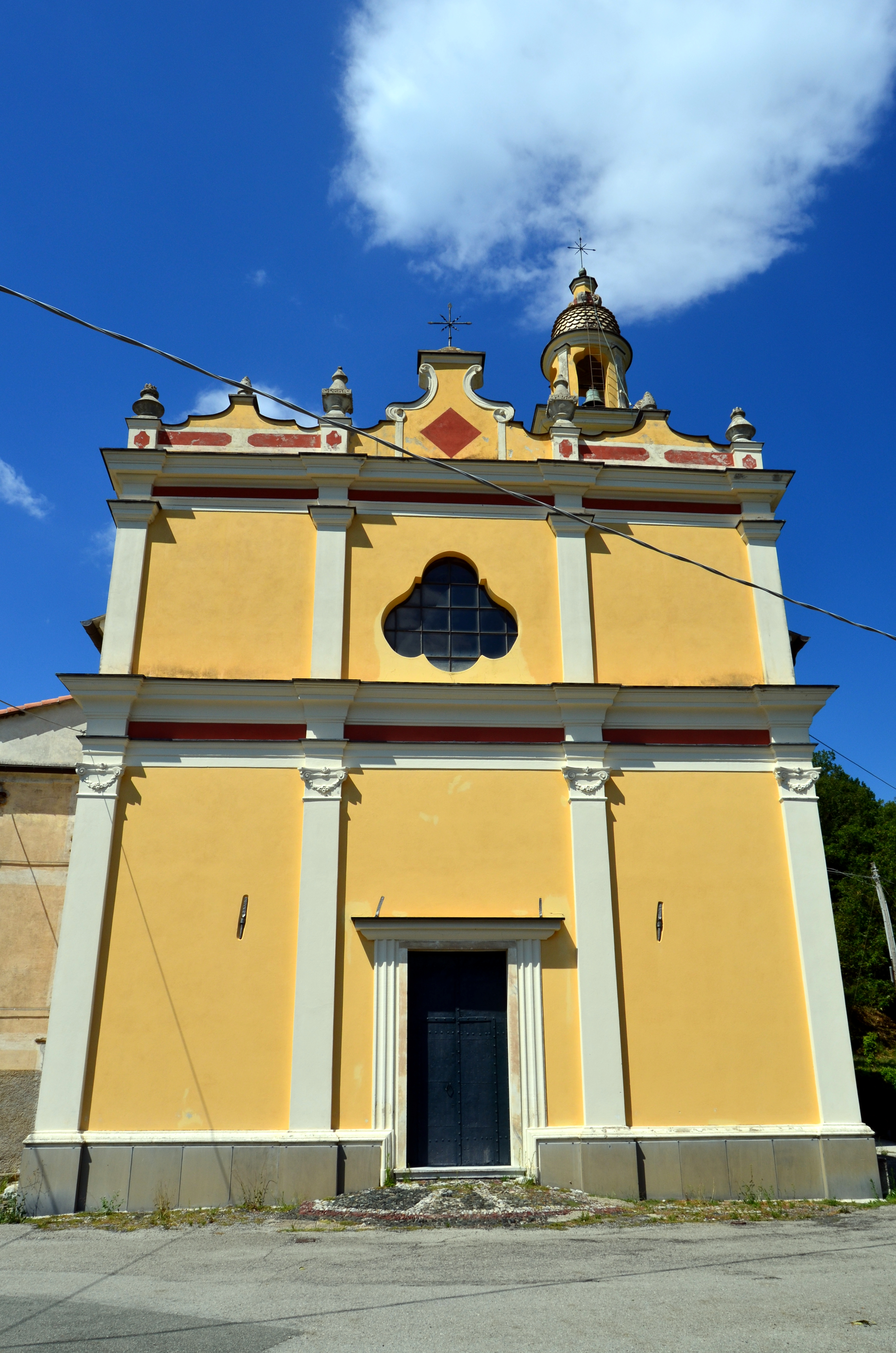 Chiesa di San Pietro di Zerli, Ne, Liguria, Italia